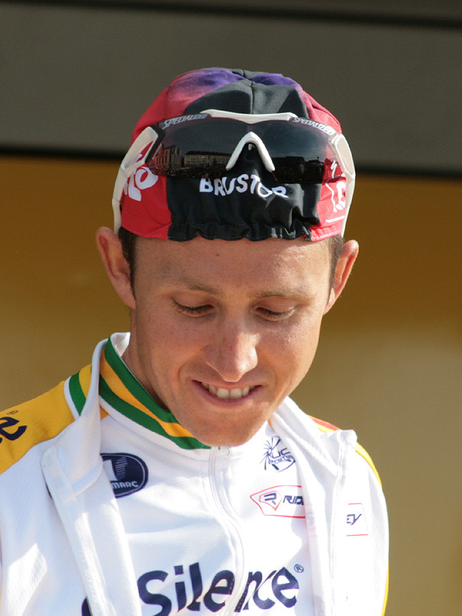 Matthew Lloyd voor de start van Luik-Bastenaken-Luik 2008